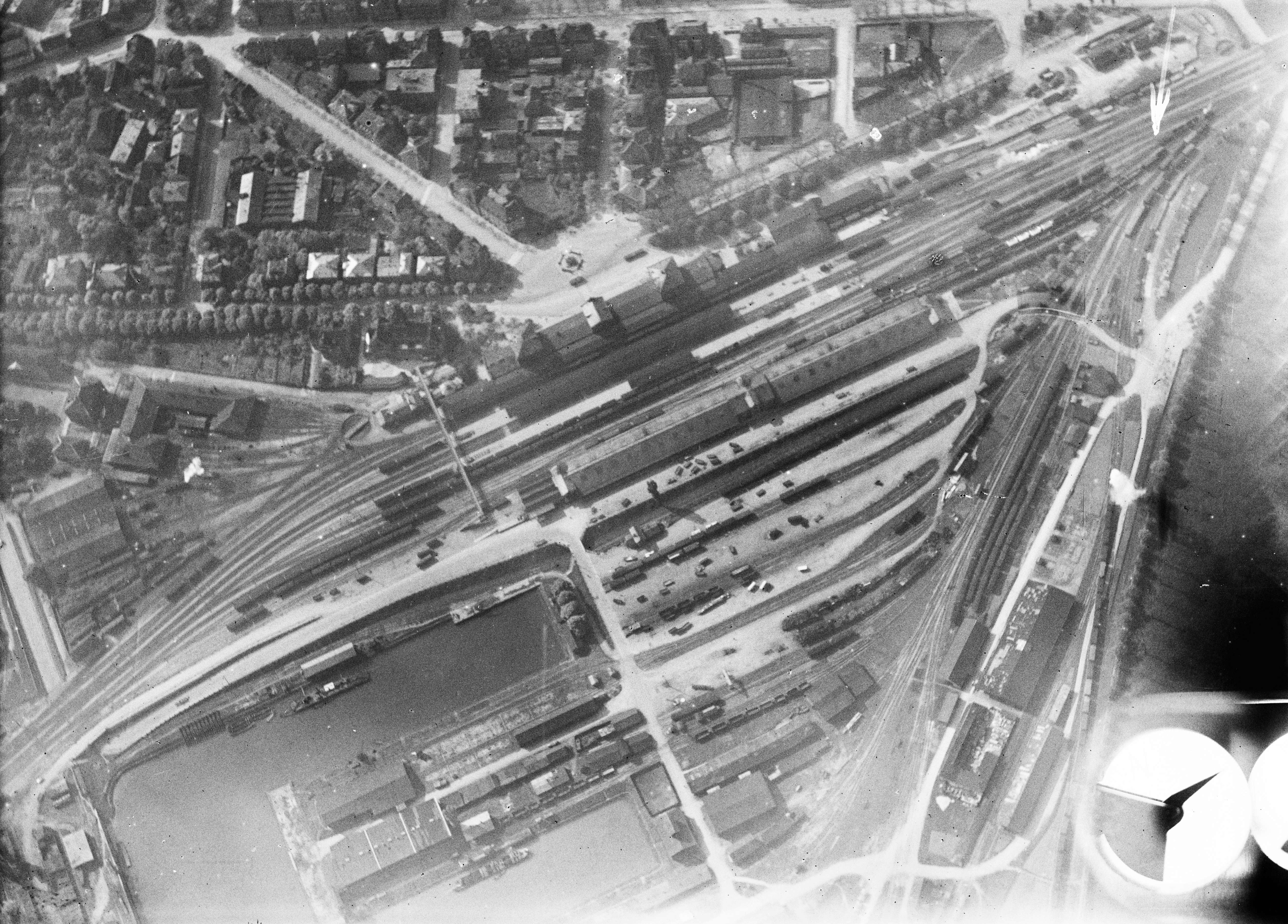 Luftbild des Heilbronner Hauptbahnhofs und seiner Umgebung im Jahr 1918, vermutlich zu militärischen Zwecken aufgenommen. Links mittig das Heilbronner Bahnbetriebswerk, links unten der Winterhafen.